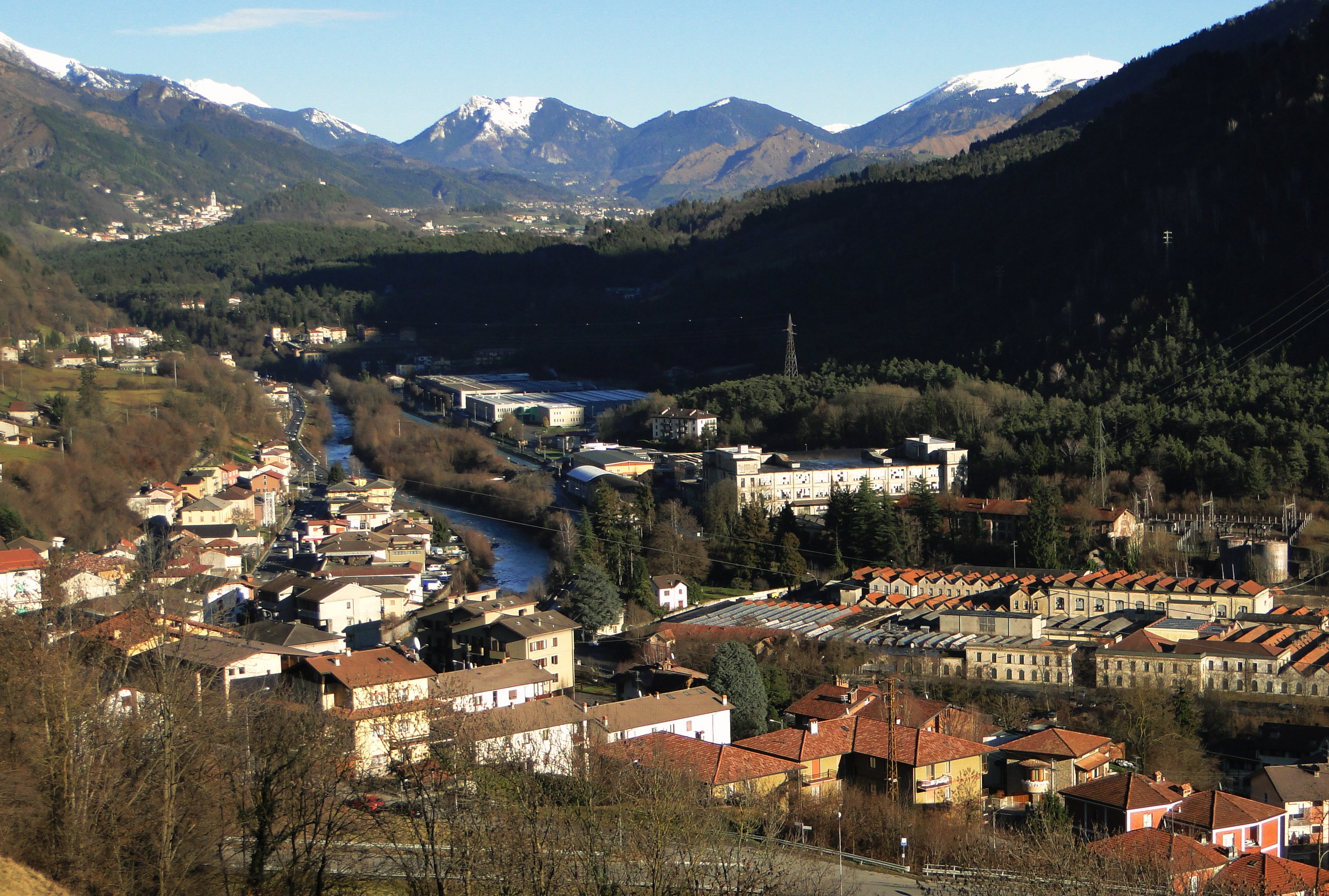 Panorama di Ponte Nossa (BG)